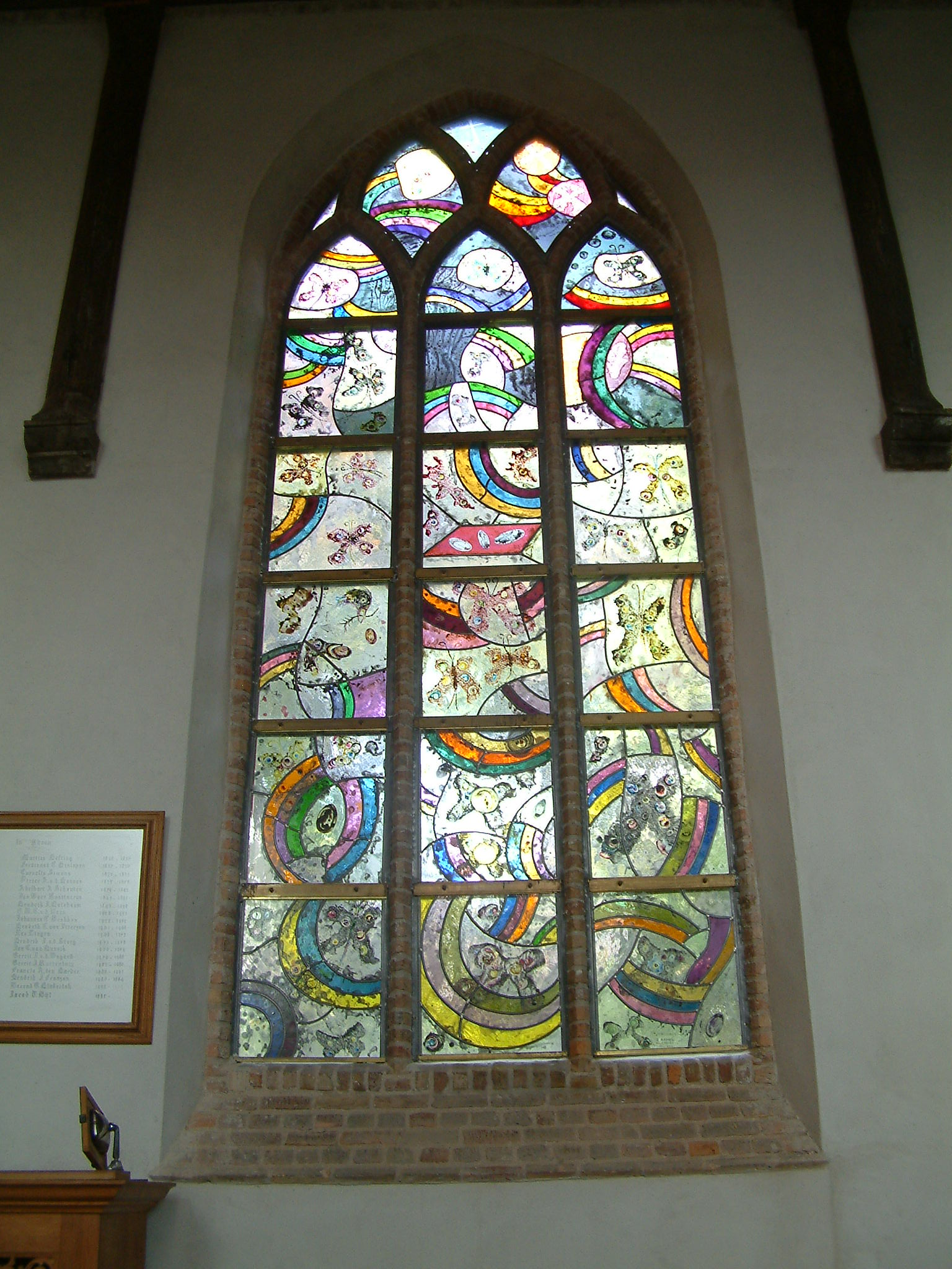 Hervormde kerk van Rhoon - Raam Ark van Noach-Regenboog